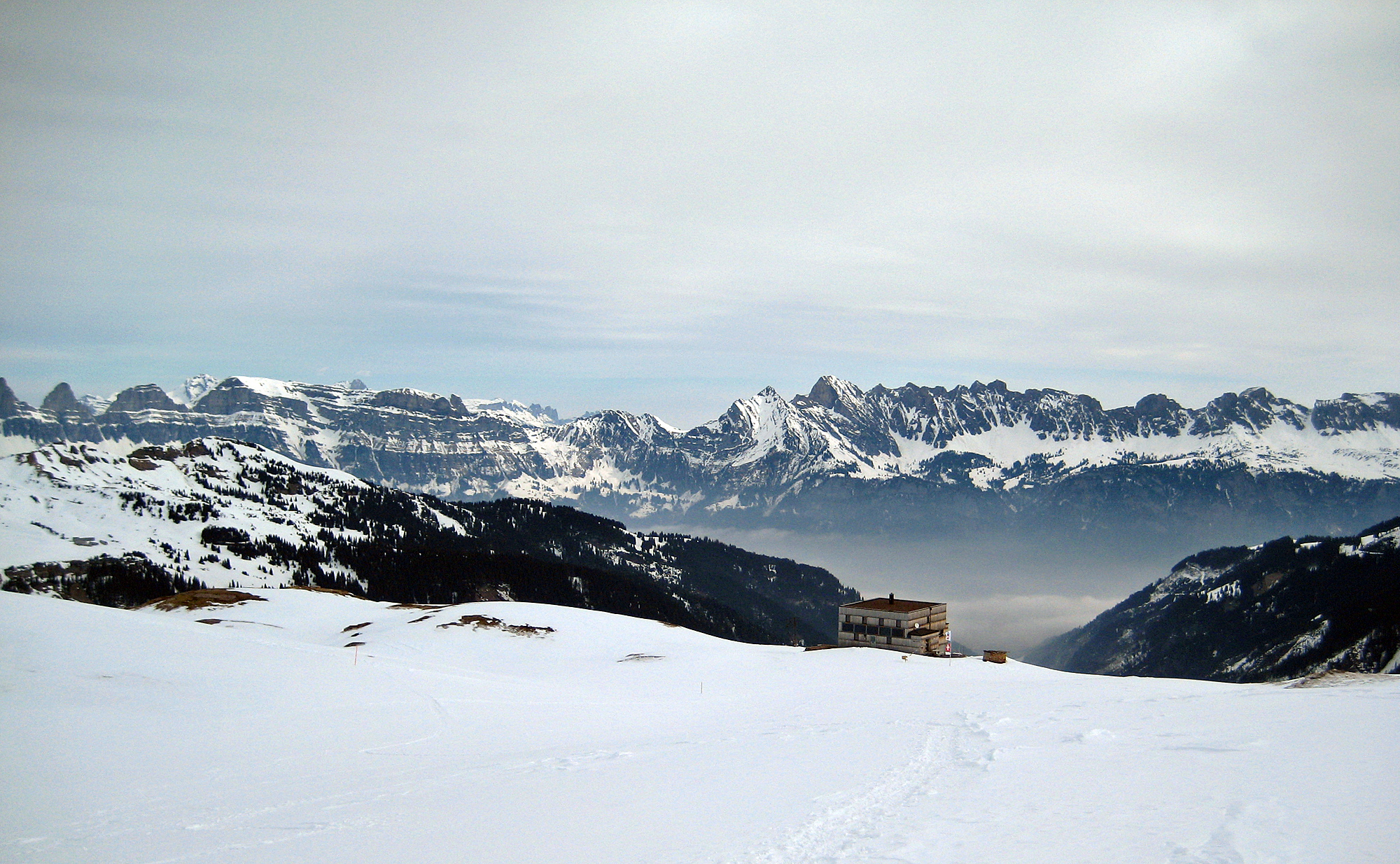 Spitzmeilenhütte mit Churfirsten im Hintergrund